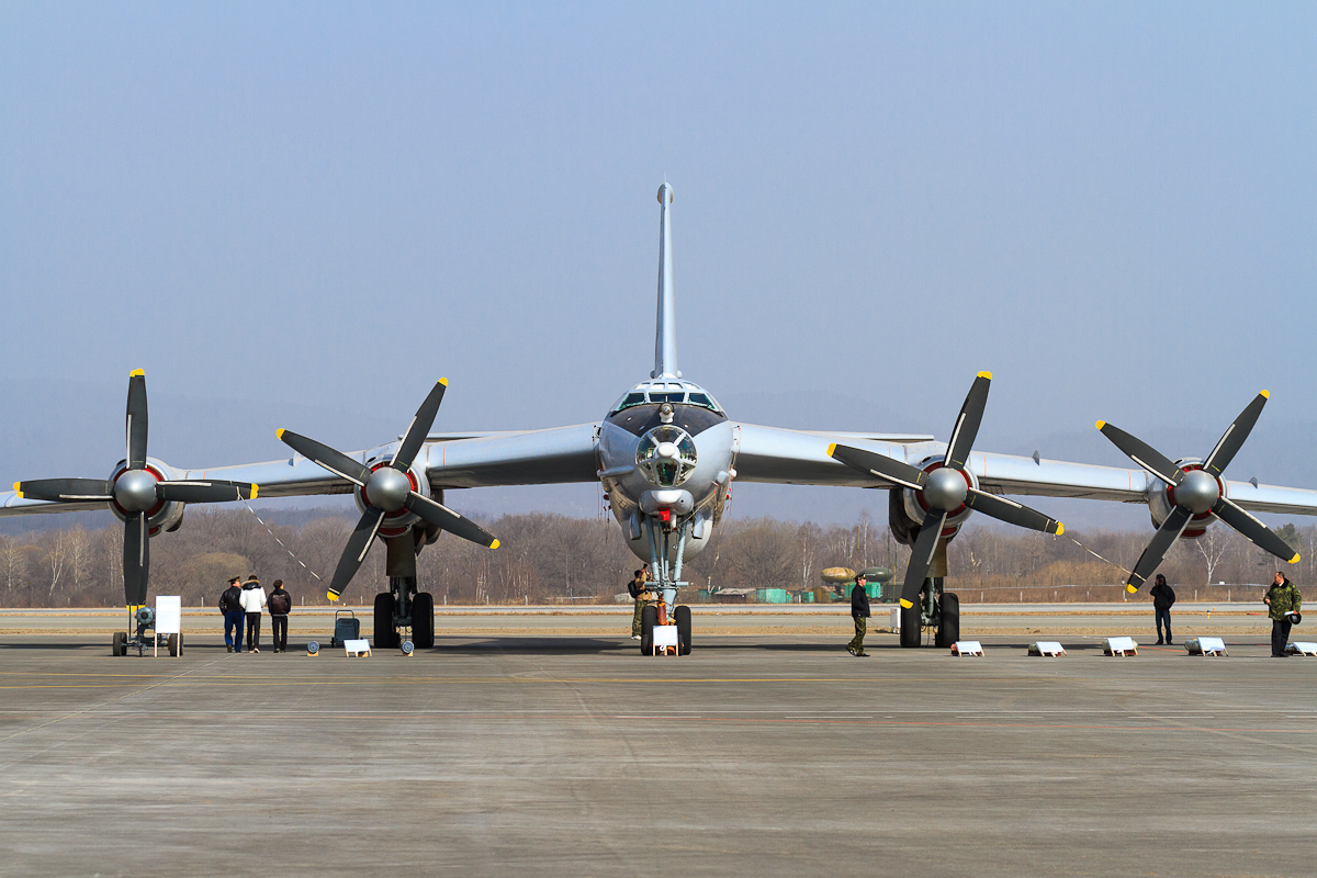 _MG_0095-2